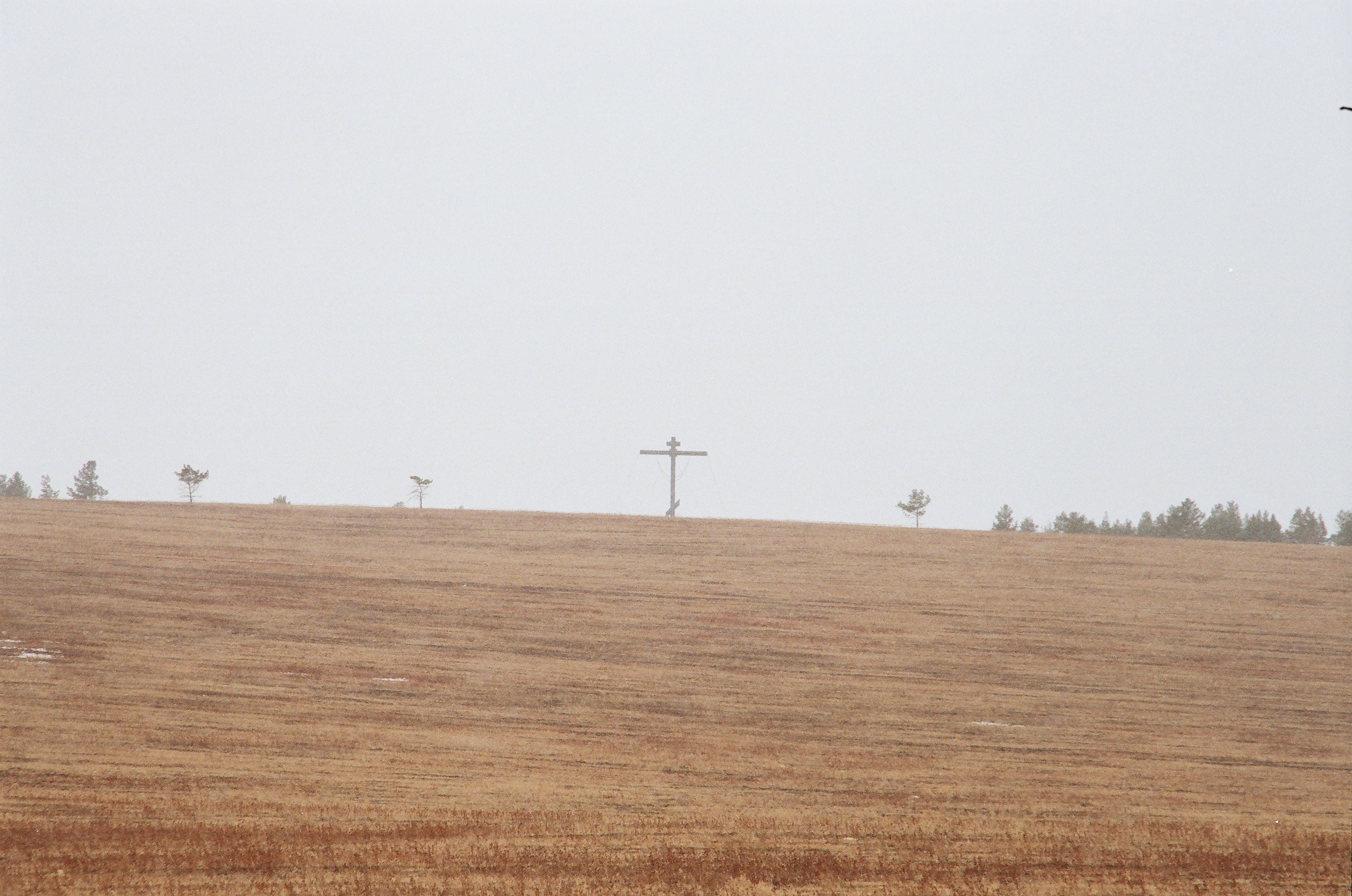 Крест на горе Убиенных. Селенгинский район, Гусиное озеро.